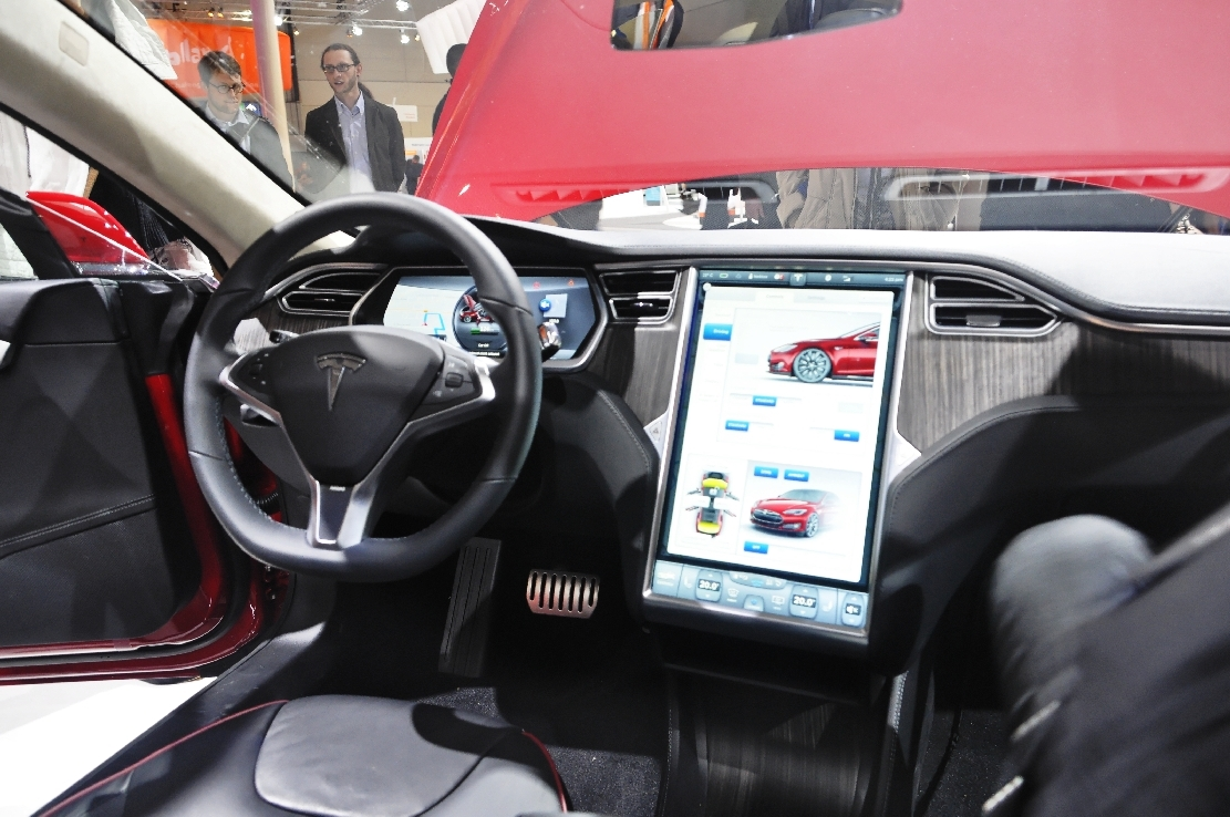 Hannover-Messe 2014Tesla Motors